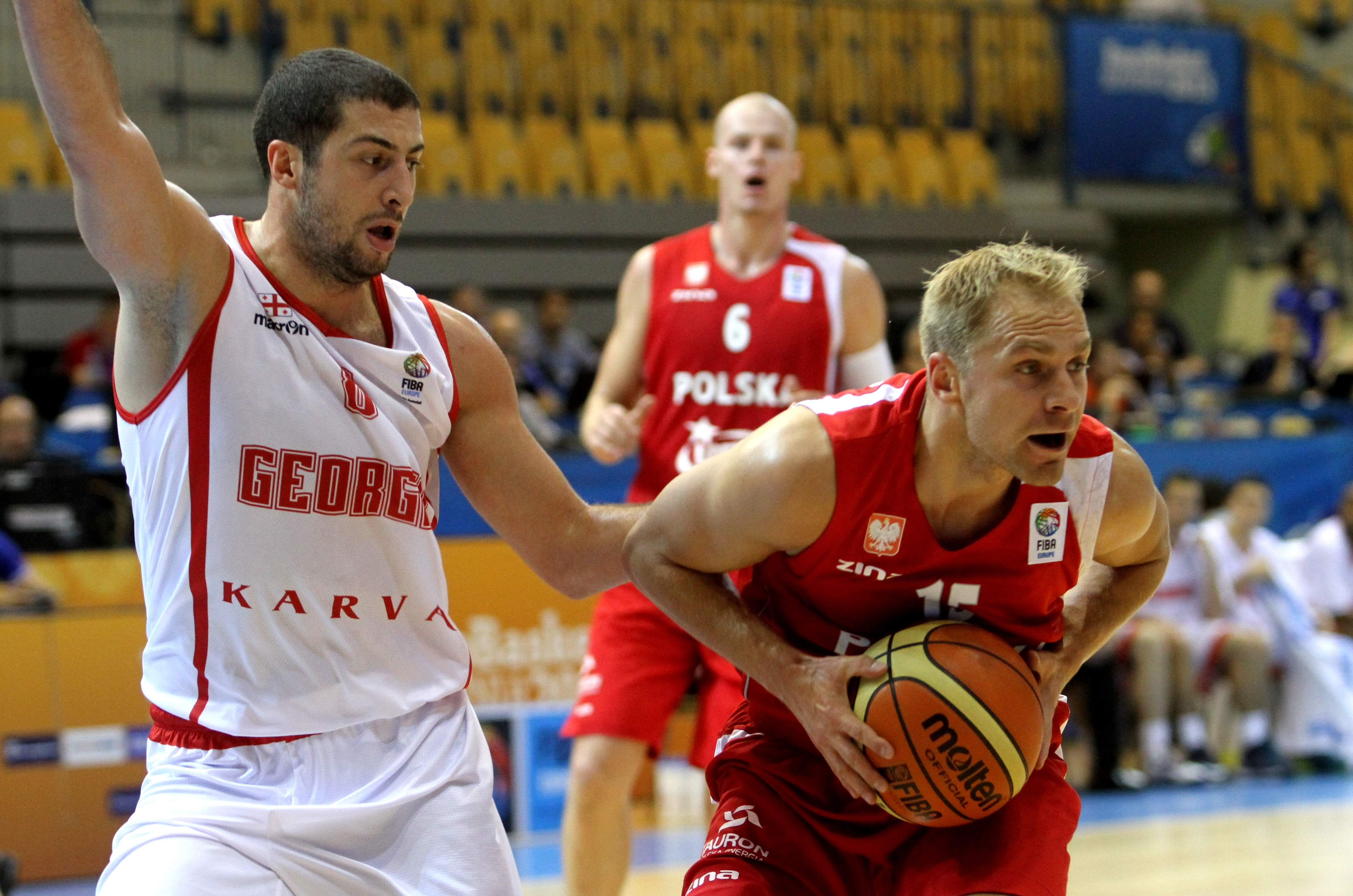 Reprezentacja Polski koszykarzy z 2013 roku. Łukasz Koszarek